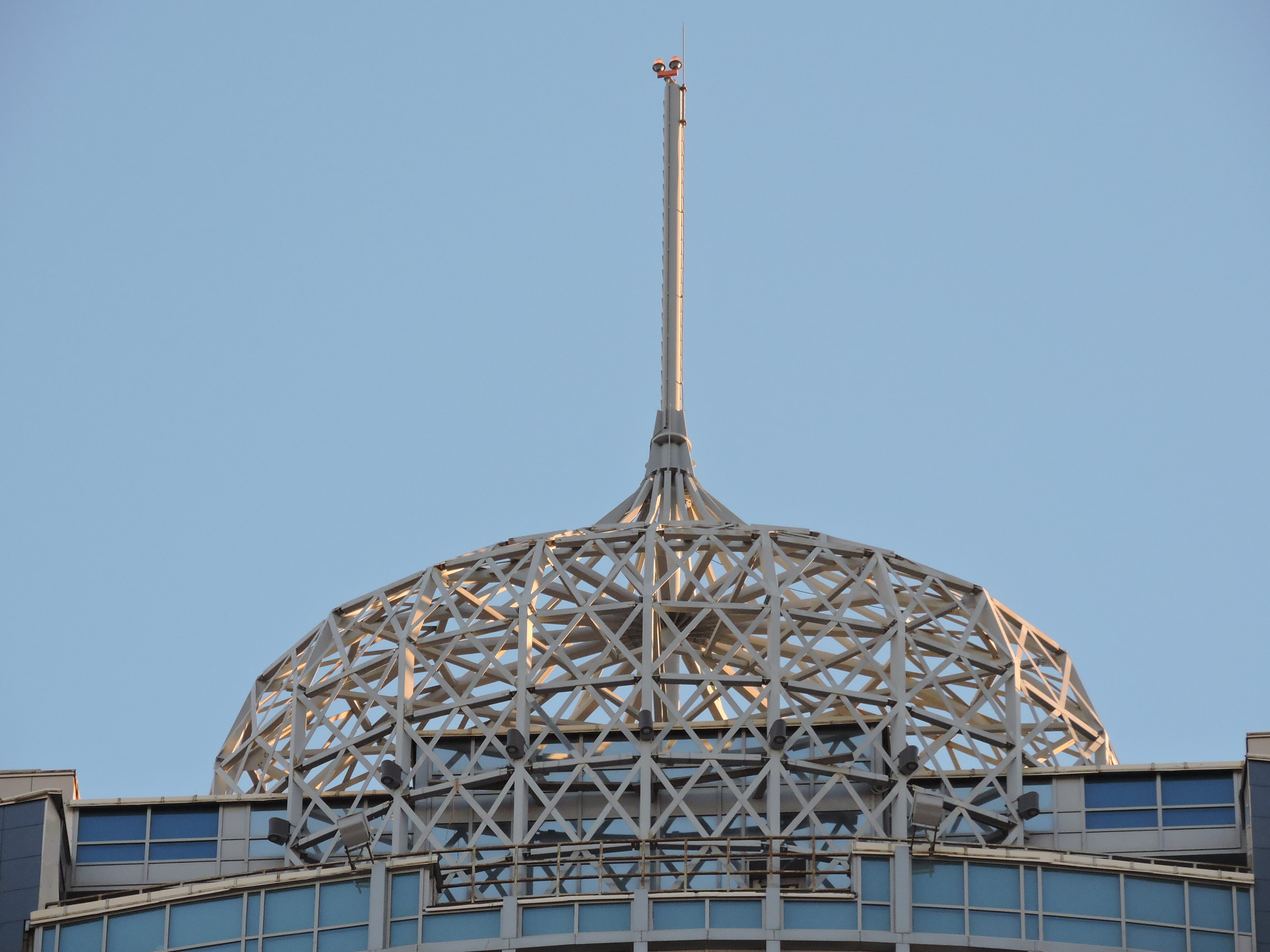 Этот решётчатый купол венчает ЖК "Князь Александр Невский". Высота по шпилю равна 124 метрам